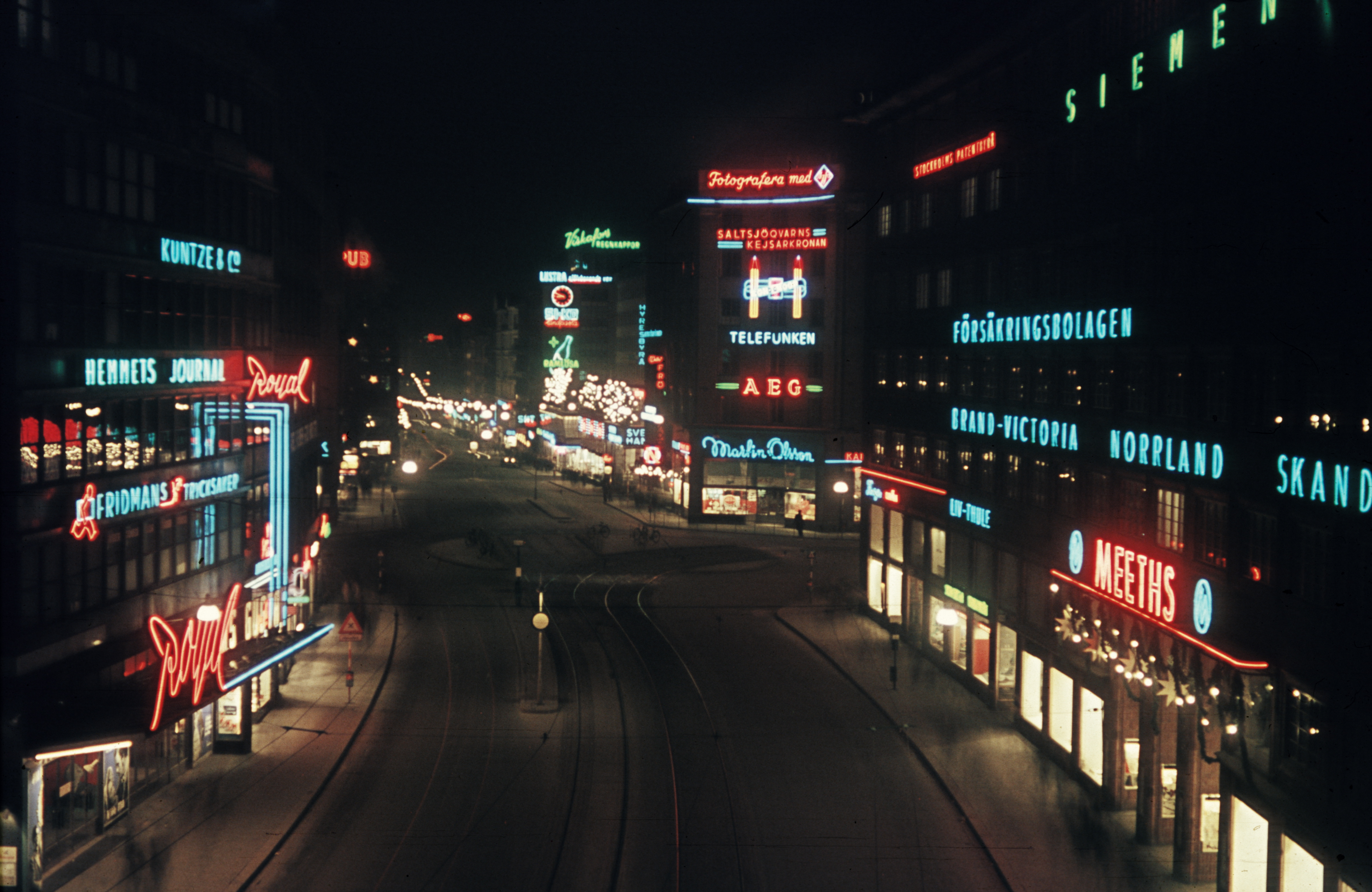 Kungsgatan västerut före Sveavägen. Kungsgatan i mörker med neonskyltar